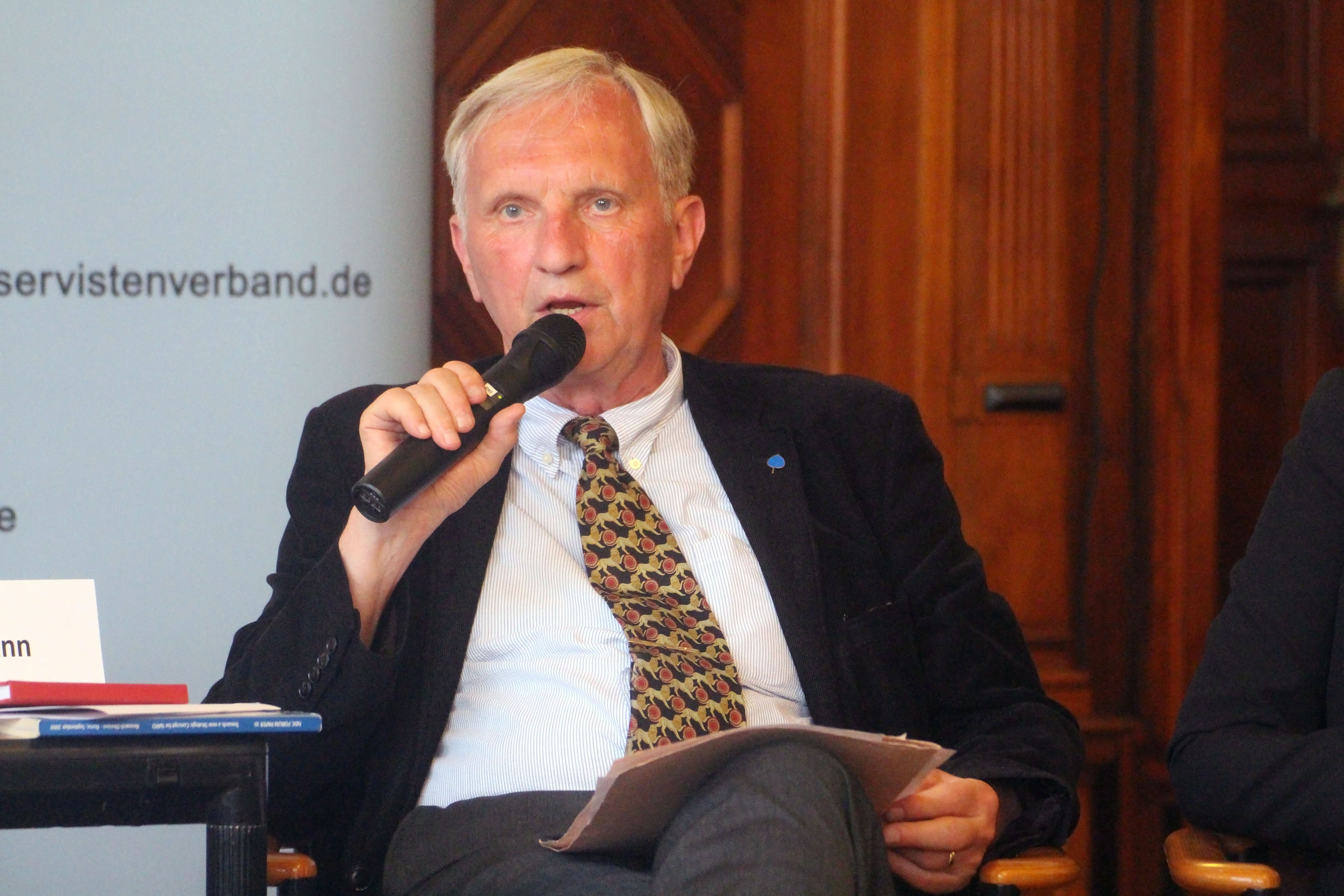 Klaus Wittmann - Brigadegeneral a.D. der Bundeswehr - Juni 2014